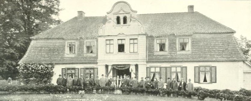 Gutshaus Hohenfelde bei einem Besuch der Deutschen Landwirtschaftlichen Gesellschaft, vor 1913; scan aus Heinrich Gerd Dade: Die deutsche Landwirtschaft unter Kaiser Wilhelm II. Band 2, Halle a.S.: C. Marhold 1913 S. 305